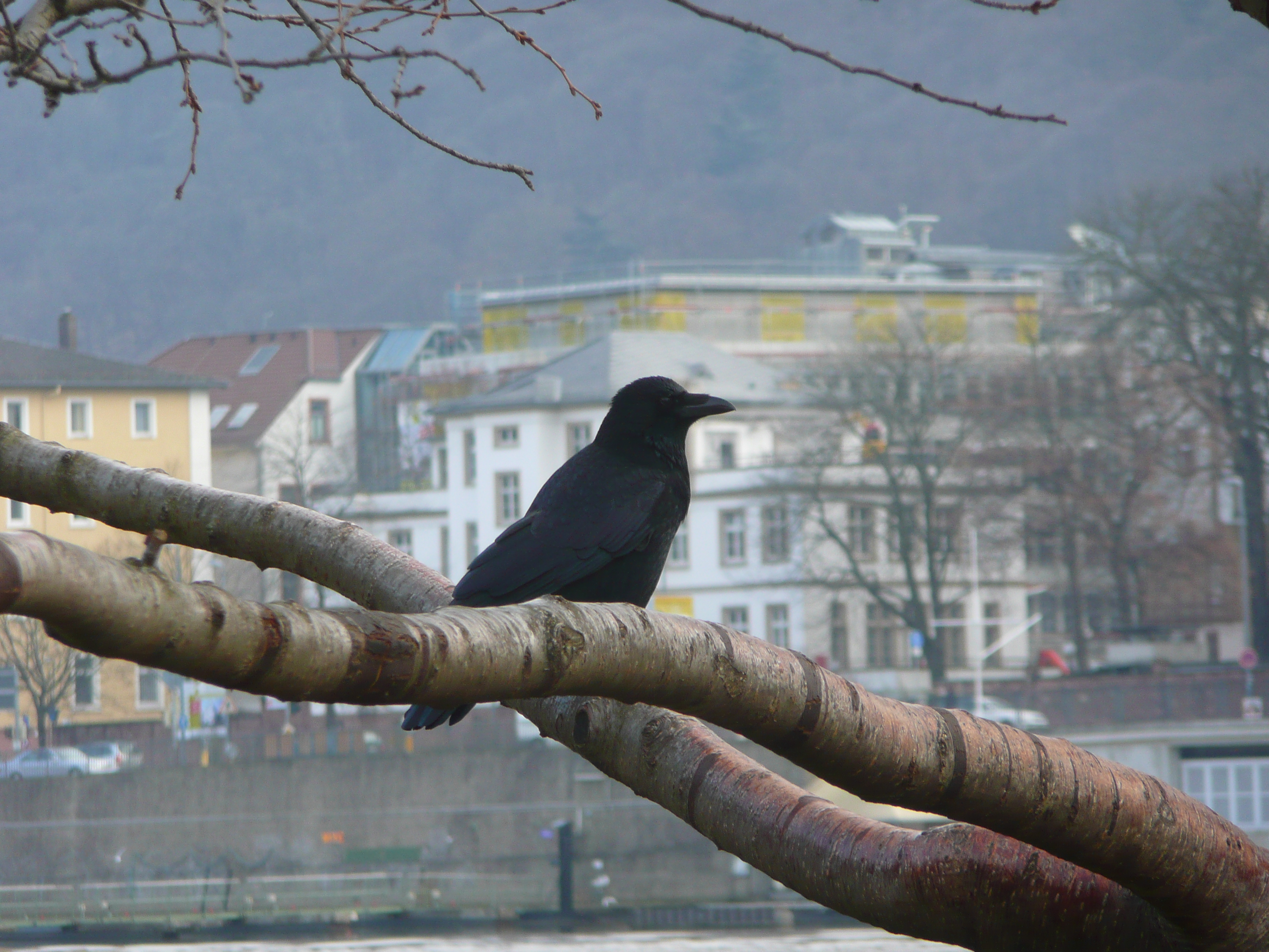 Rabenkrähe Corvus corone, fotografiert in Heidelberg (Baden-Württemberg, Deutschland)